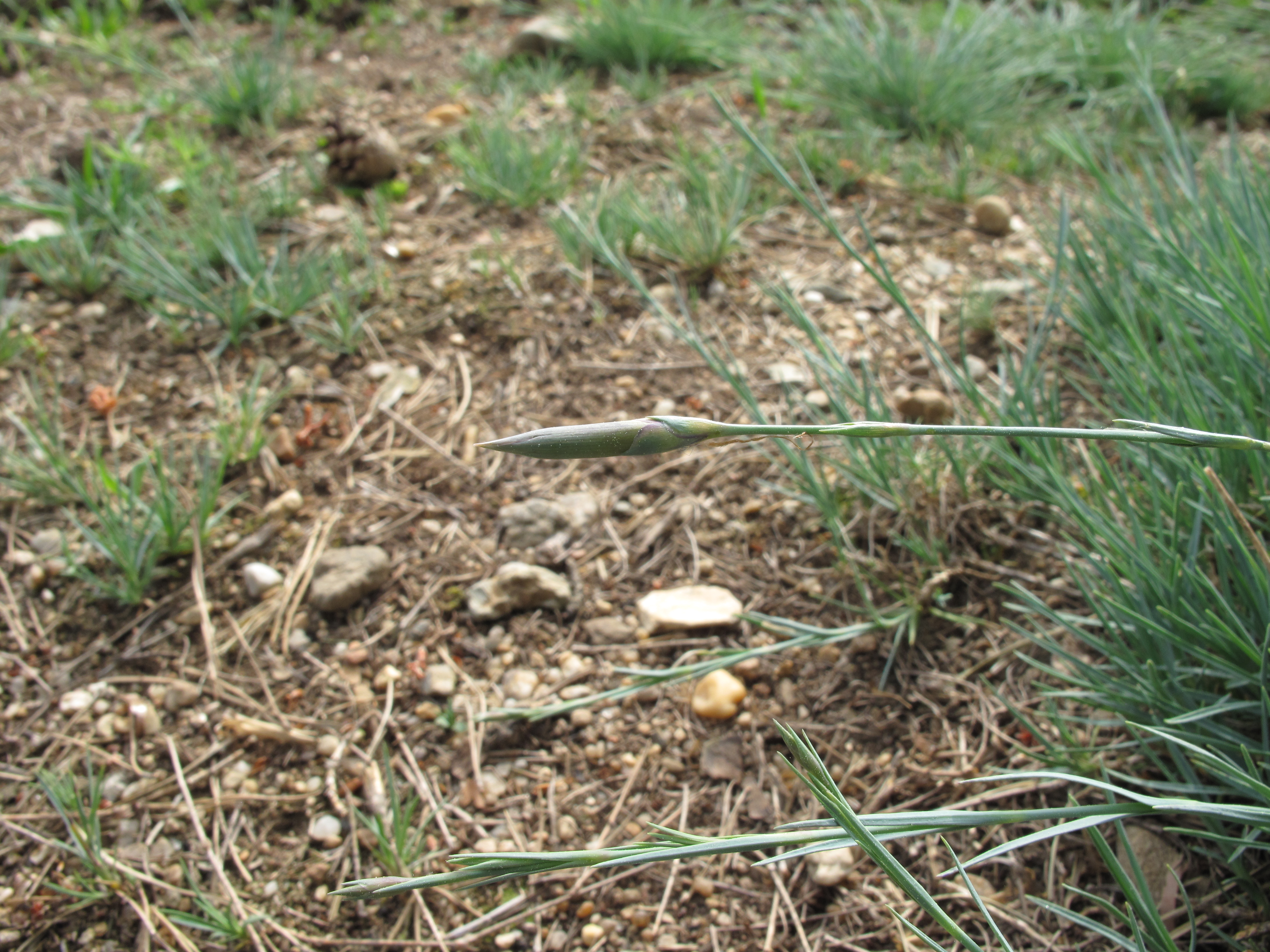 Poupě hvozdíku písečného českého (Dianthus arenarius subsp. bohemicus) v národní přírodní památce Kleneč. Okres Litoměřice, Česká republika.